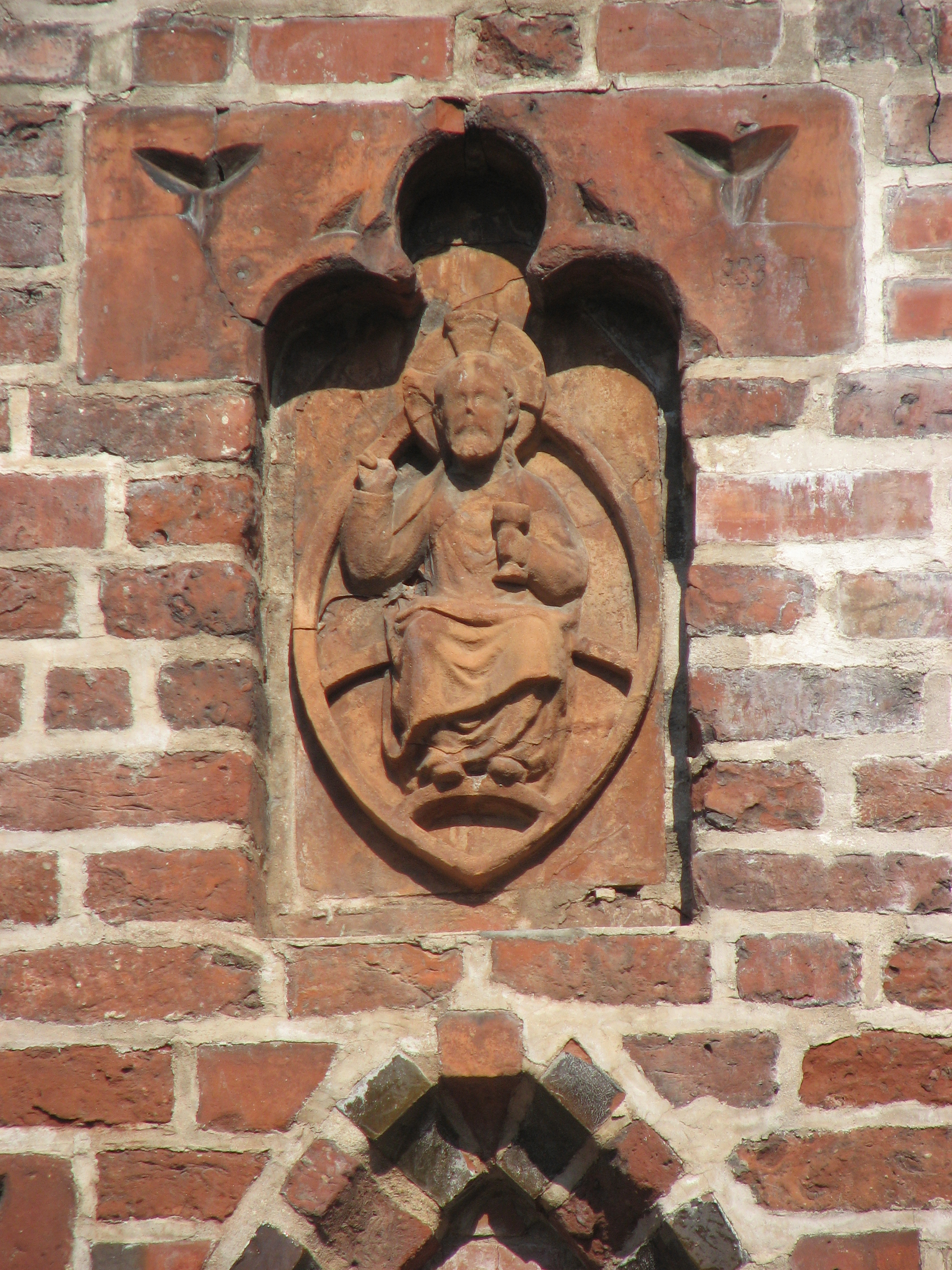 Tartu Jaani Church, Tartu, Estonia